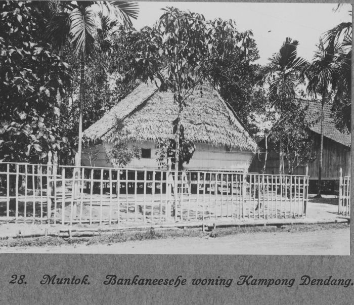 foto. Woonhuis in Dendang